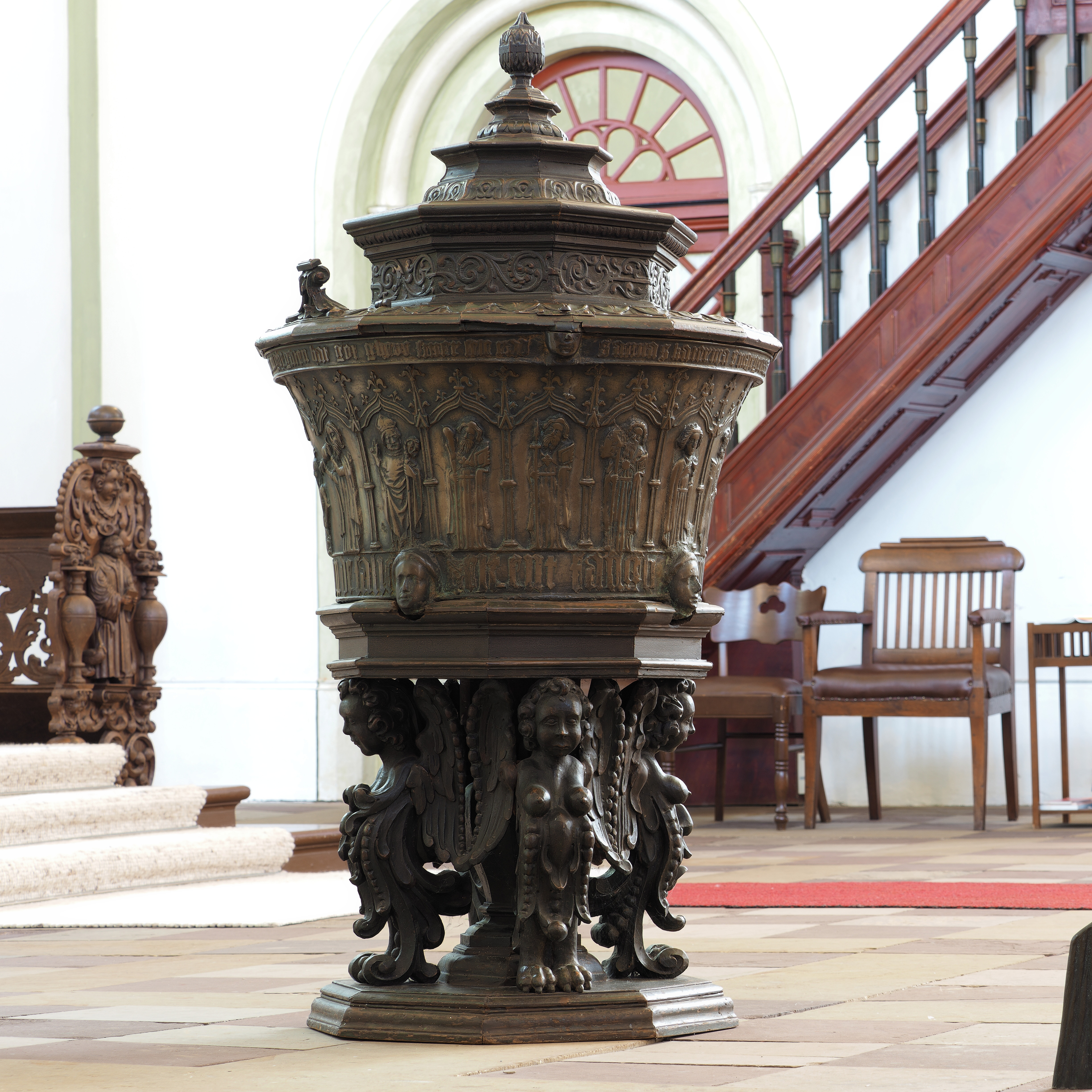 Gotisches bronzenes Taufbecken gegossen von Hinrich Klinghe in der St. Magnus Kirche in Esens (Kreis Wittmund, Ostfriesland) aus dem Jahr 1474. Ansicht aus nördlicher Richtung.